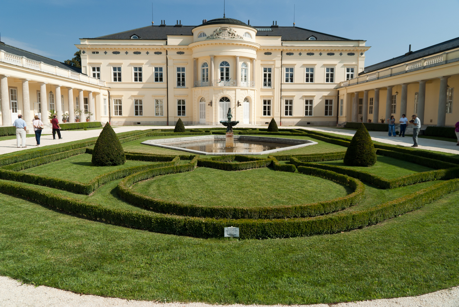 Károlyi-kastély (Fehérvárcsurgó, Petőfi u. 2.) This is a photo of a monument in Hungary. Identifier: 3637